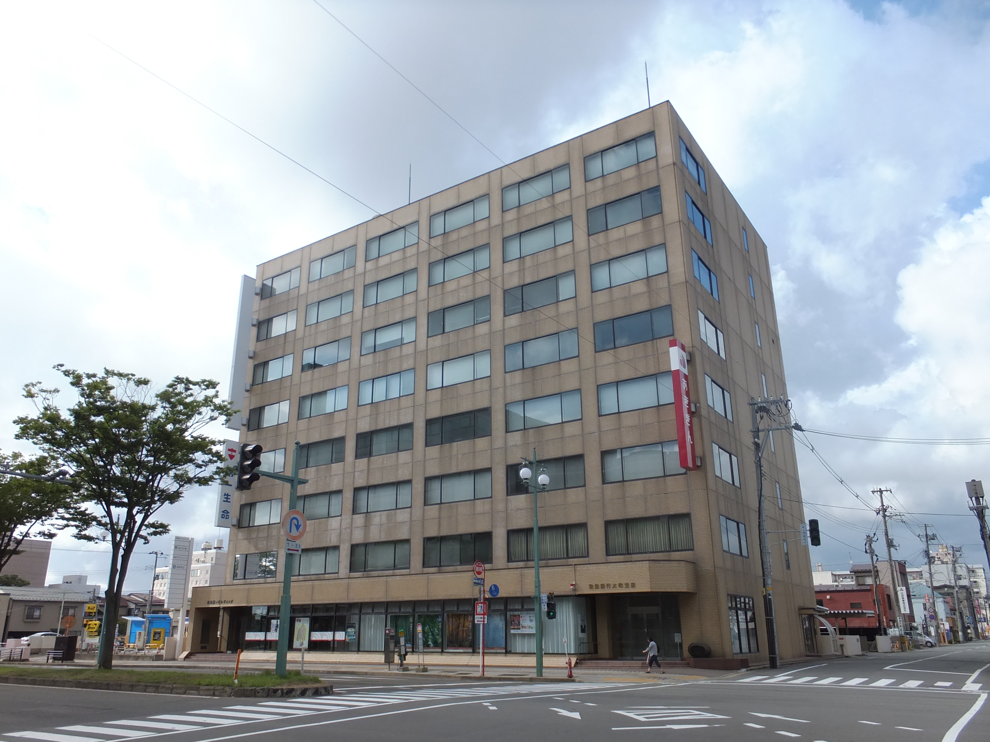 秋田第一ビル、秋田銀行大町支店が入る（秋田市大町）。ビル入り口には秋田銀行発祥の地碑がある。